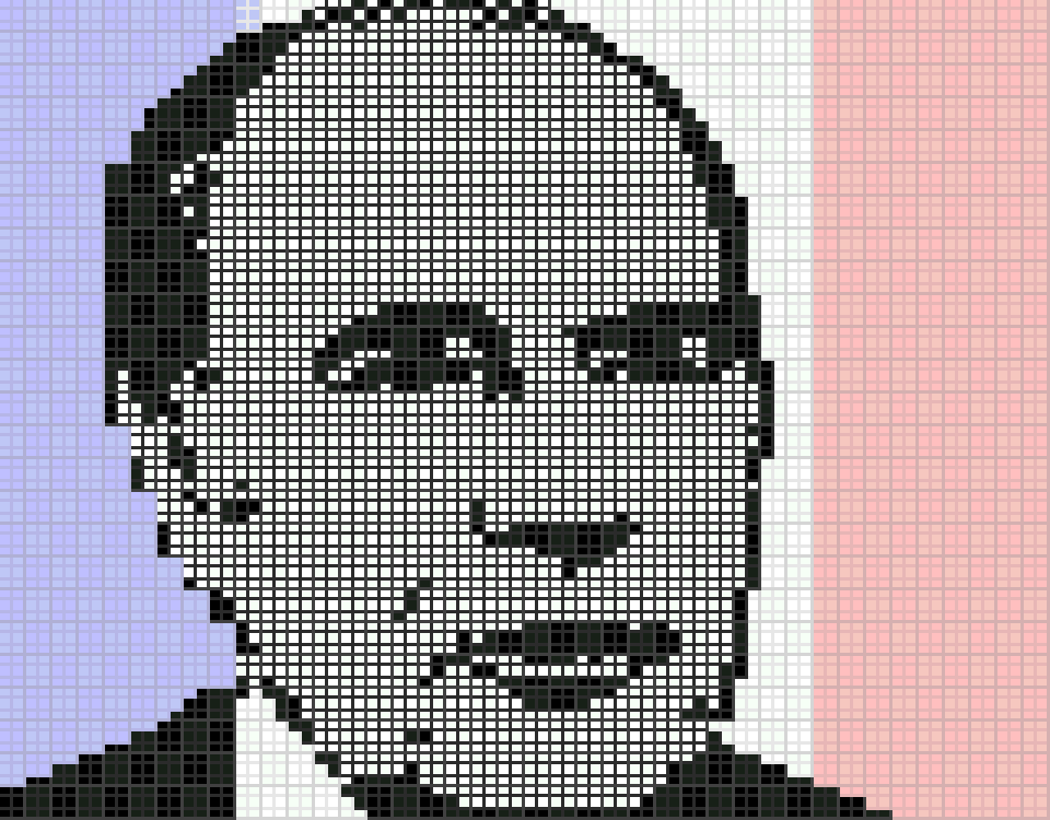 • Portrait de François Mitterrand en Minitel art Vidéotex le 10 mai 1981 à 20 heures sur Antenne 2. • Version 320×250 pixels (1ère ligne ajoutée car l'animation était très ambiguë sur les calvities). • Le ratio diffère de la photo sur INA.fr, où le portrait est plus mince (je vous laisse corriger). • Copie visuelle fidèle aux blocs tels que vus à la télévision (caractères semi-graphiques testés). • Source et Minitel-artiste inconnus [contribution souhaitée] - cette photo est-elle déjà oubliée ? • (Il s'agit d'un style de dessin à l'encre de Chine ; le haut semble avoir été retouché à droite.) • (Le fichier a peut-être ensuite circulé à l'époque ; mais concernant celui du portrait de VGE… ?)